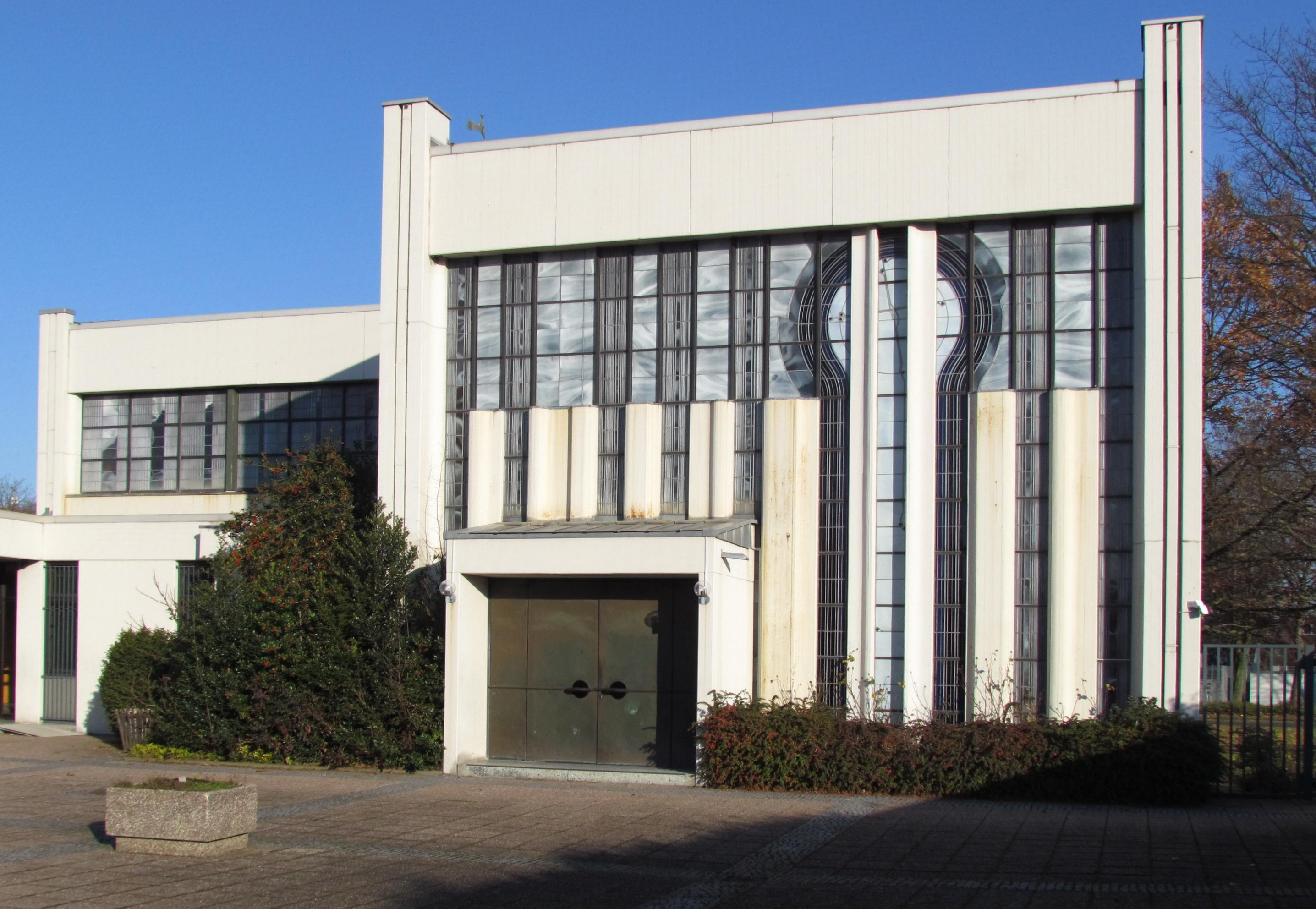 Kirchen und Kapellen in Geilenkirchen